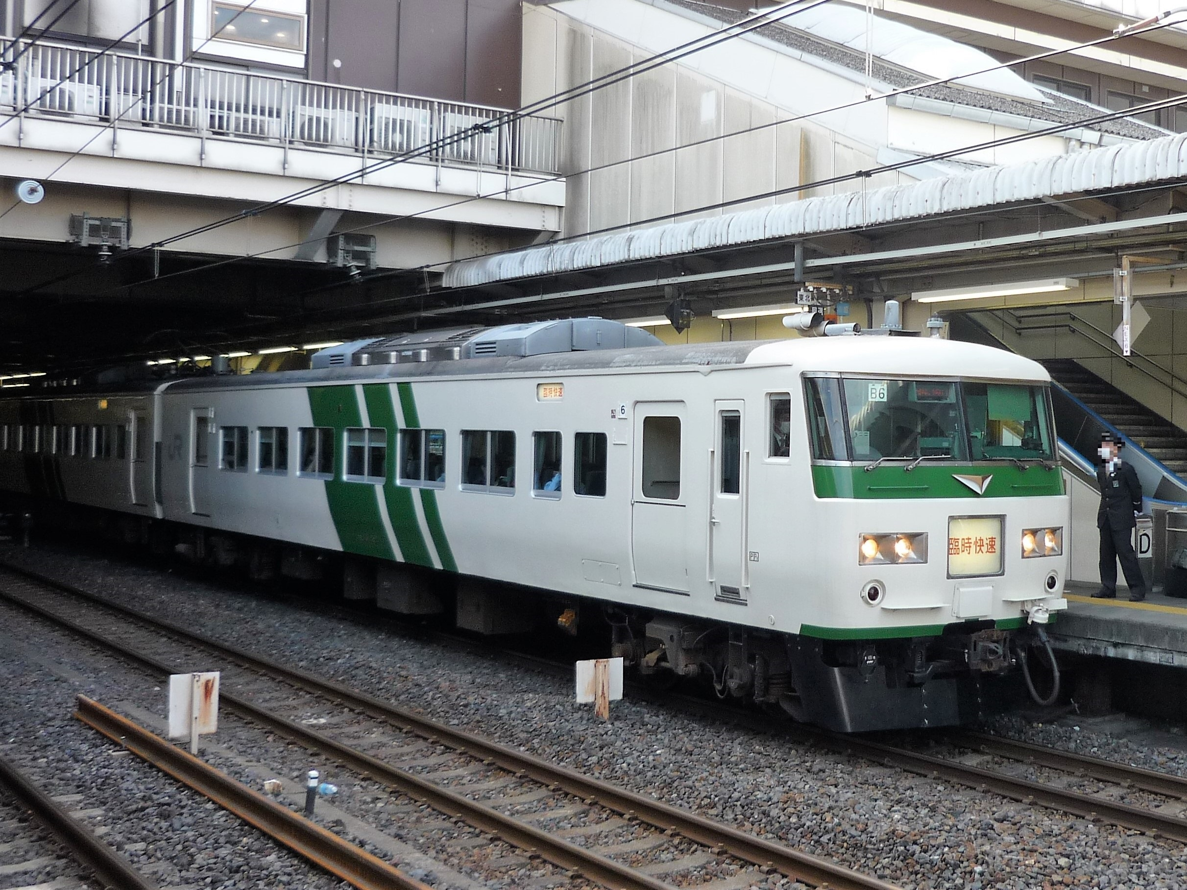 大宮駅11番線に停車中の185系B6編成・快速「川越まつり号」 先頭はクハ185-312 Panasonic Lumix DMC-FS3